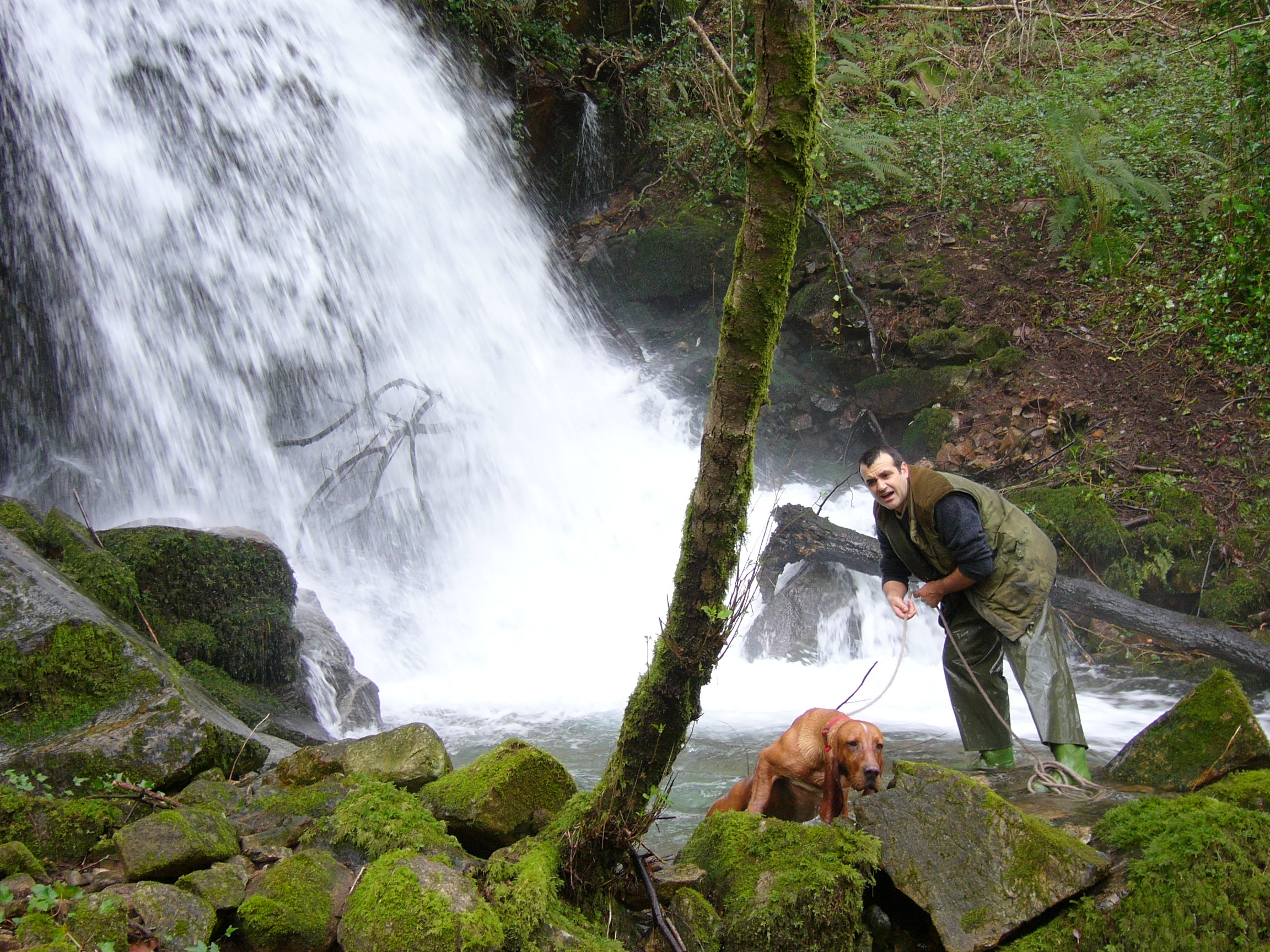 Montero gallego rastreando con su sabueso español.